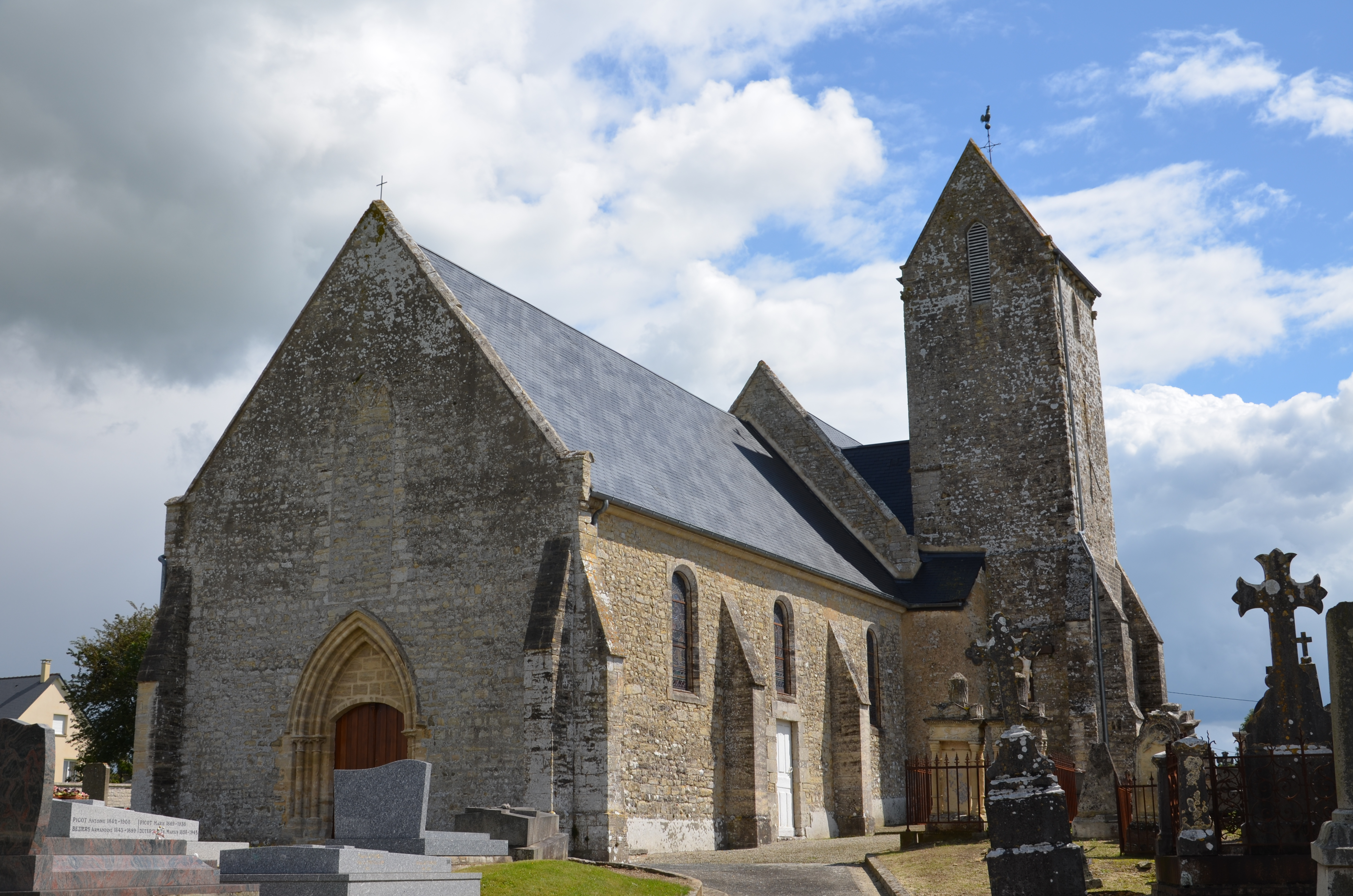 Église Notre-Dame de Rubercy.